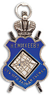 Description Жетон Военно-топографической съемки Юго-западного пограничного пространства DateС.-Петербург, 1900 г. «Эдуард», С.-Петербург, Жетон Военно-топографической съемки Юго-западного пограничного пространства